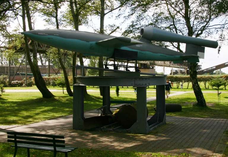 V-1 robotrepülő Peenemündeben